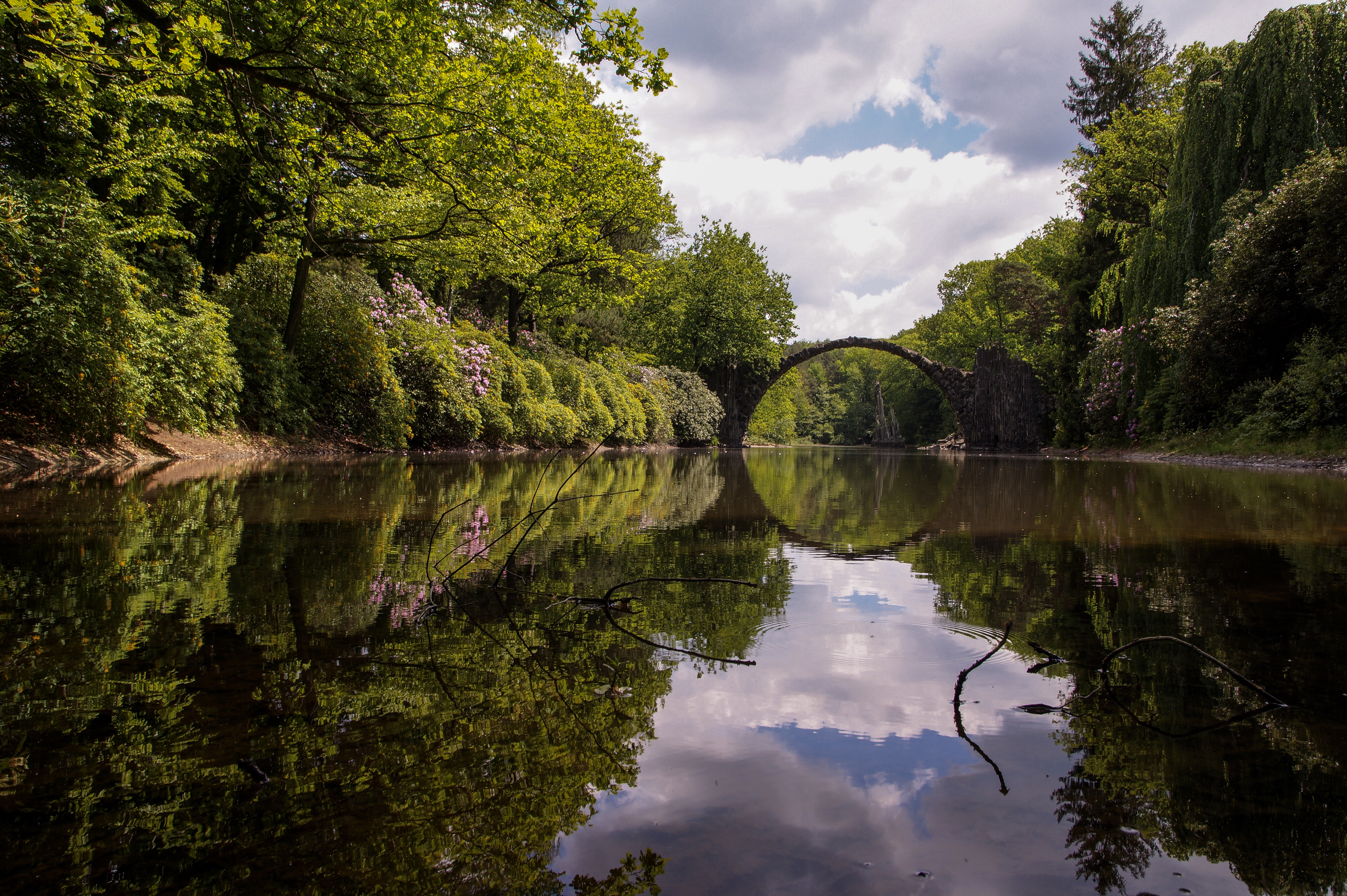 Die ca. 130 Jahre alte Rakotzbrücke im Azalleen- und Rhododendronpark Kromlau.